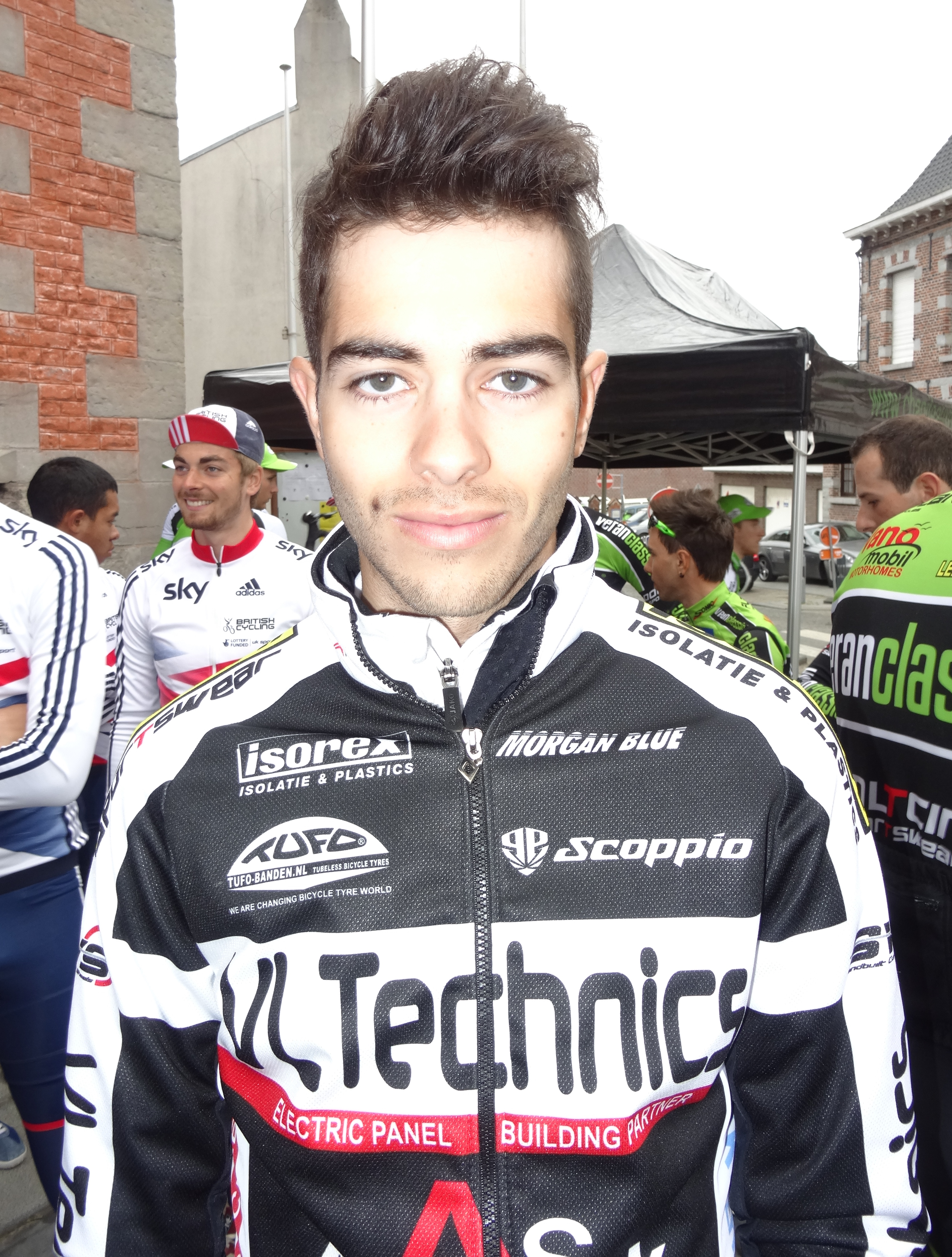 Triptyque des Monts et Châteaux 2014, étape 1, 4 avril 2014, départ d'Antoing. Depicted person: Elias Van Breussegem Depicted team: VL Technics-Abutriek The creation of these files was made possible thanks to the organizers of the Triptyque des Monts et Châteaux 2014 English | français | +/−